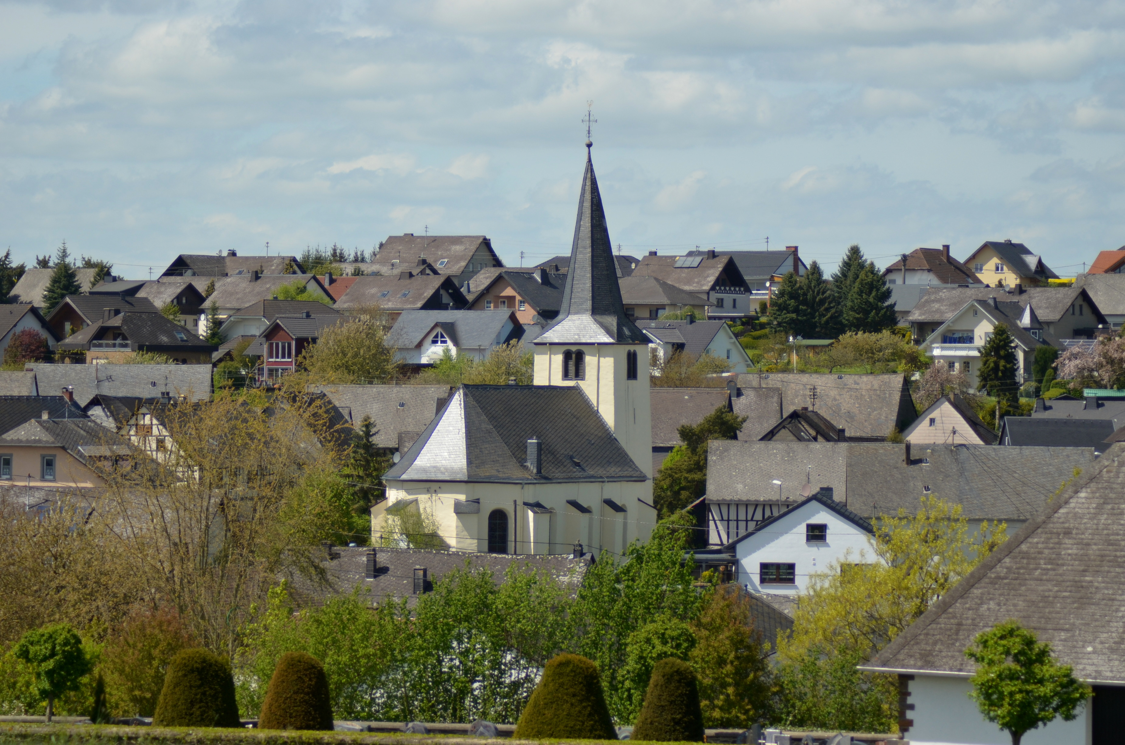 Overzicht over de plaats Lieg